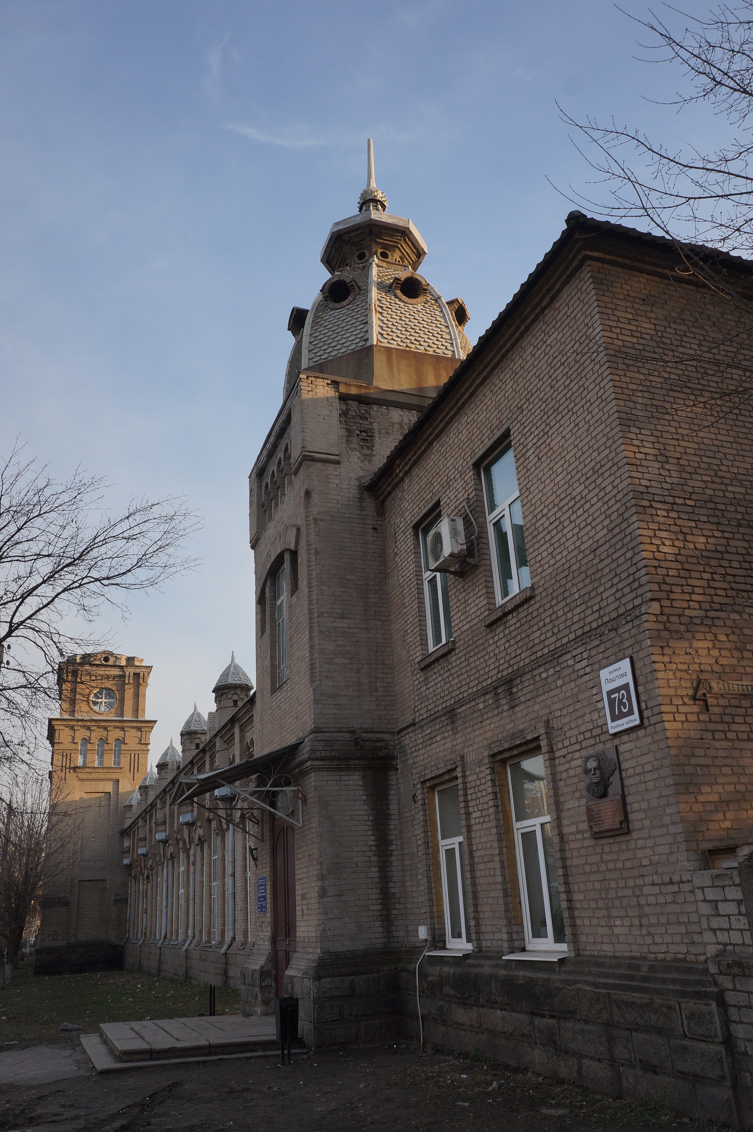 Будинок першої теплоелектростанції, Запоріжжя, вул. Поштова (Горького), 73